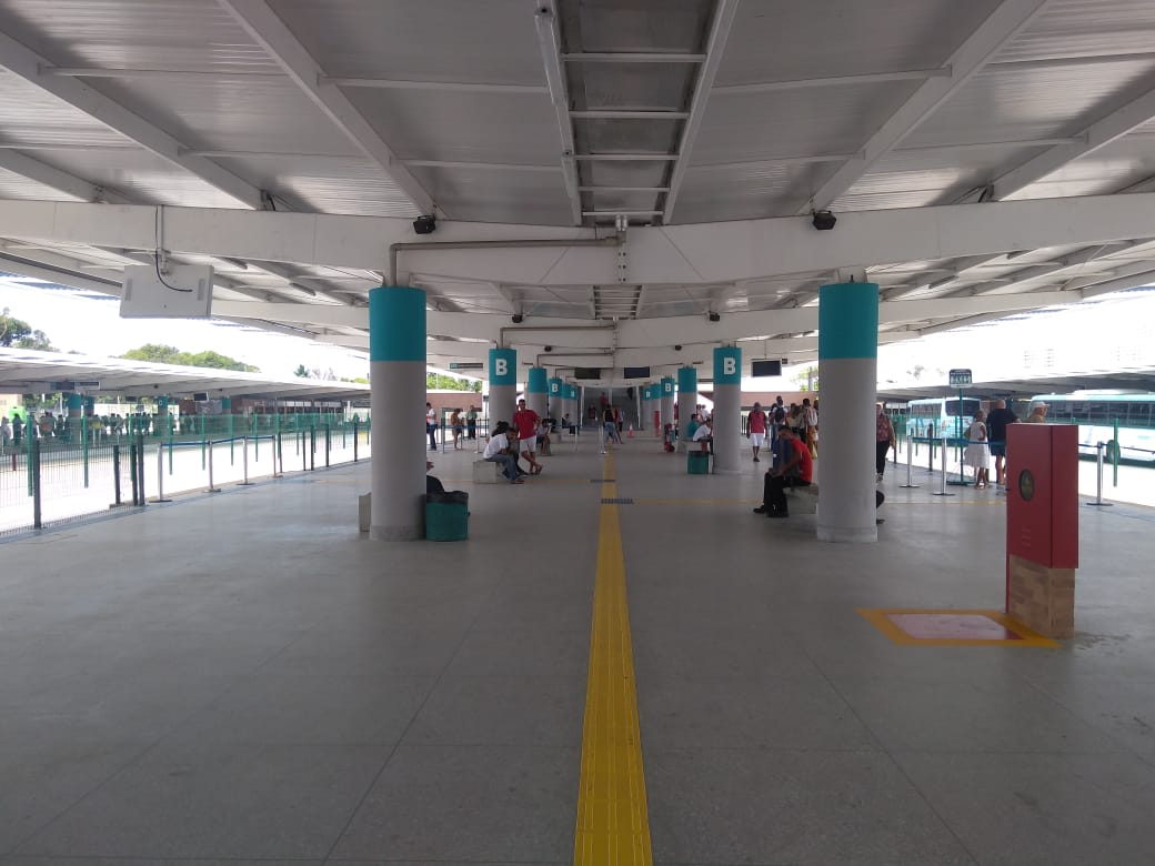 Plataforma B (Central), do Terminal de Integração Urbano da Messejana em Fortaleza, Ceará, Brasil.